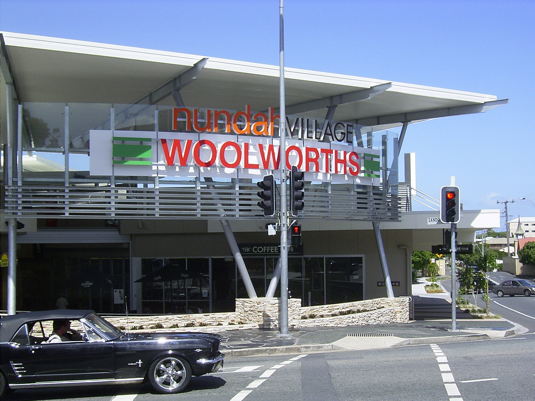 Nundah Village Shopping Center, Nundah, Australia